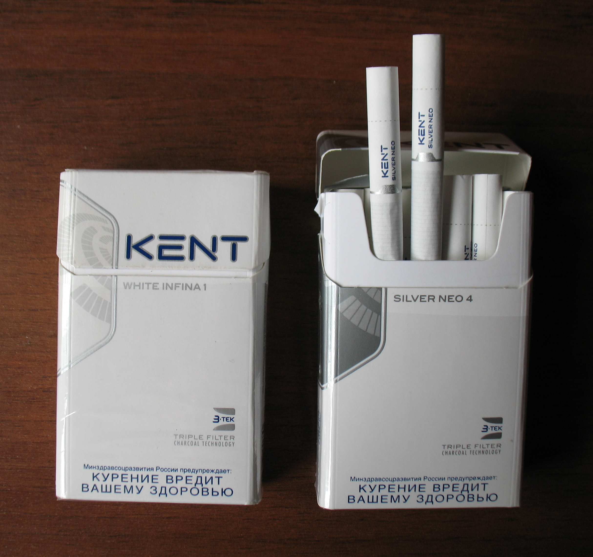 Сигареты Кент "White Infina 1" и "Silver Neo 4" (новый дизайн пачки)